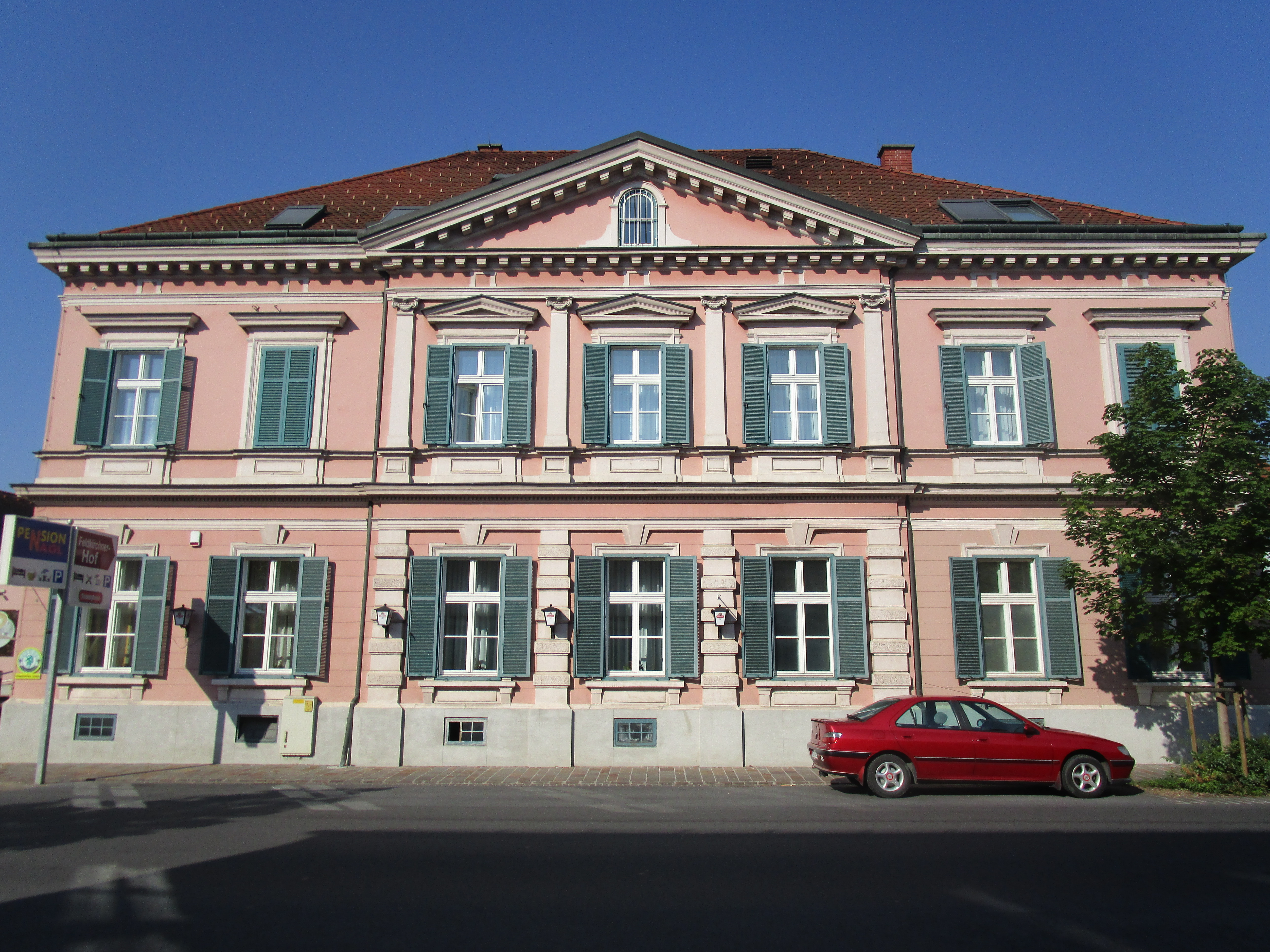 Feldkirchner Hof Straßenseite